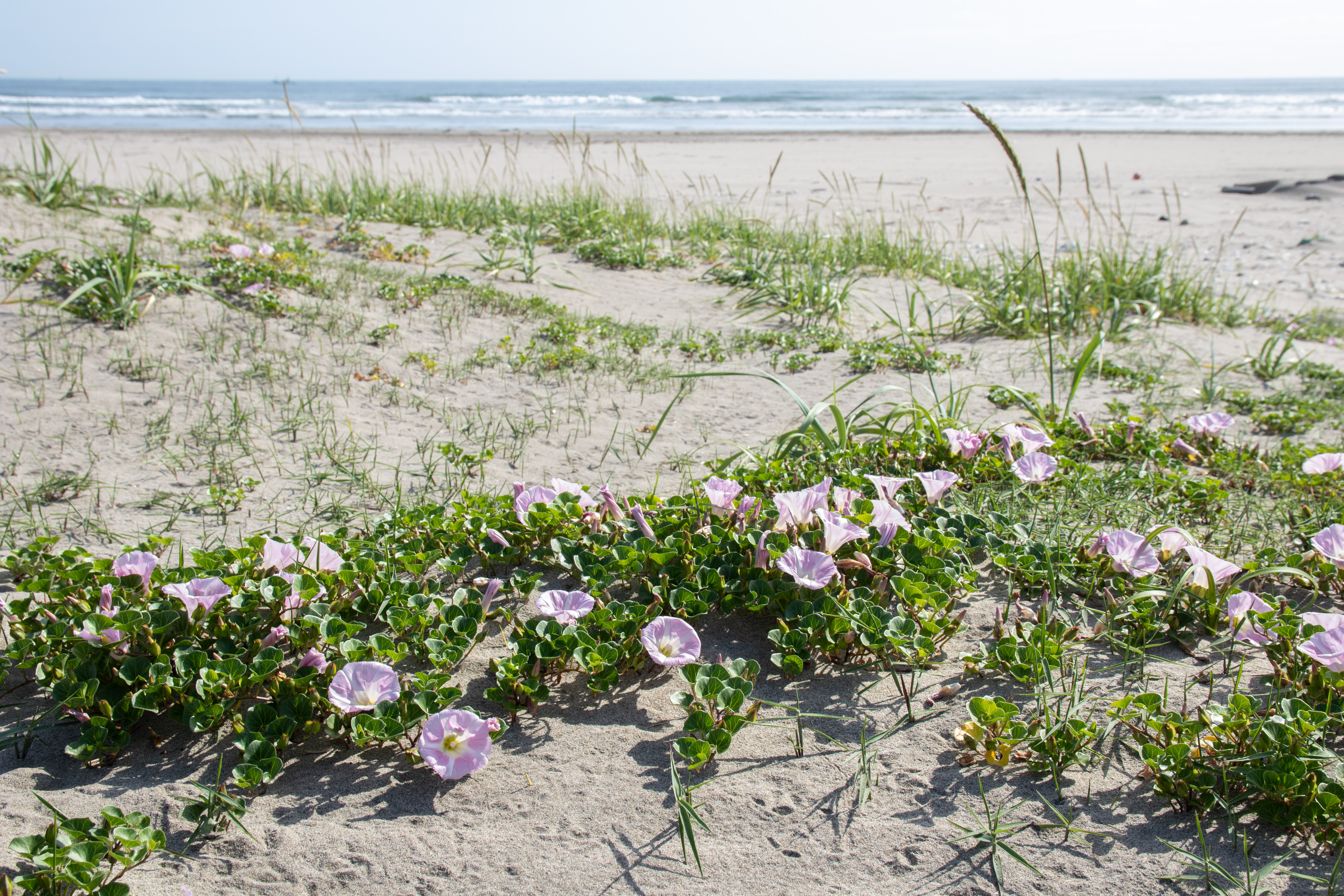 ハマヒルガオ (学名:Calystegia soldanella) 撮影地：波崎海岸（茨城県神栖市） Canon EOS 80D + Sigma 17-70mm F2.8-4 DC Macro OS HSM